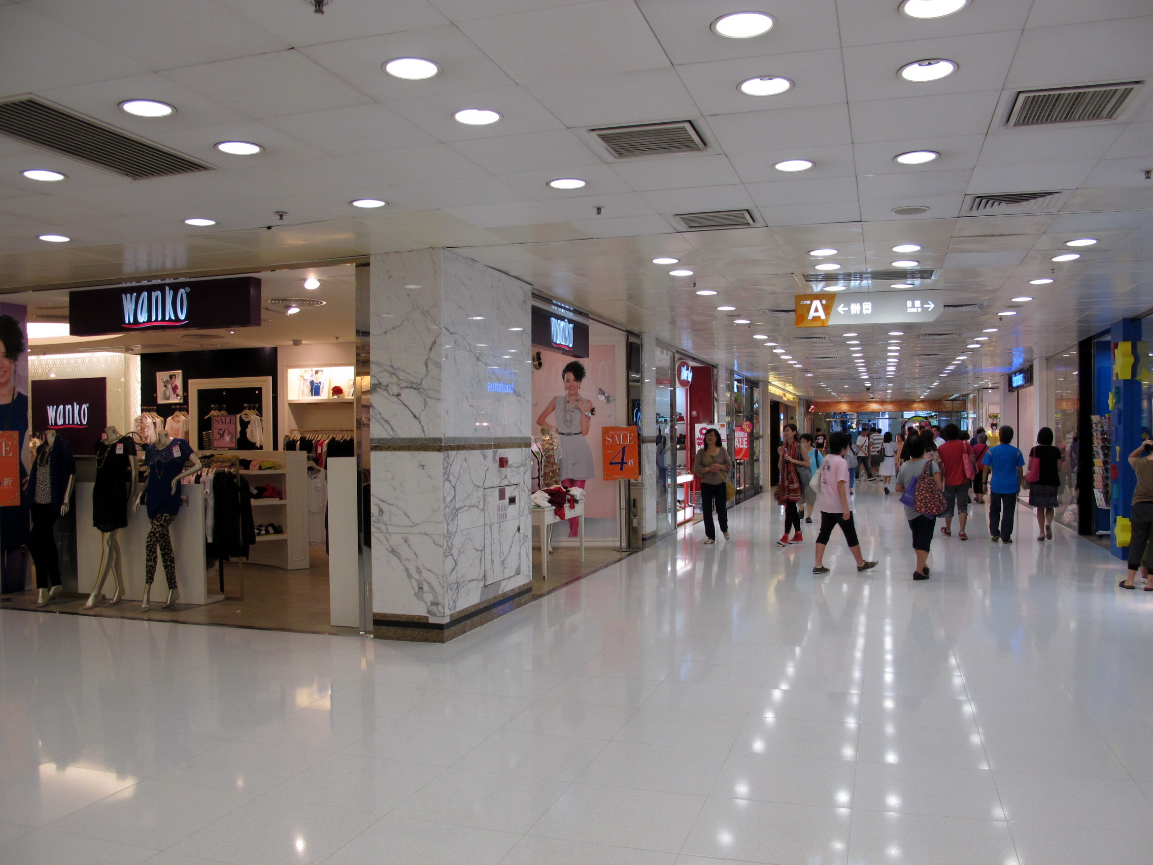 Tai Po Mega Mall Zone A Access 大埔超級城A區